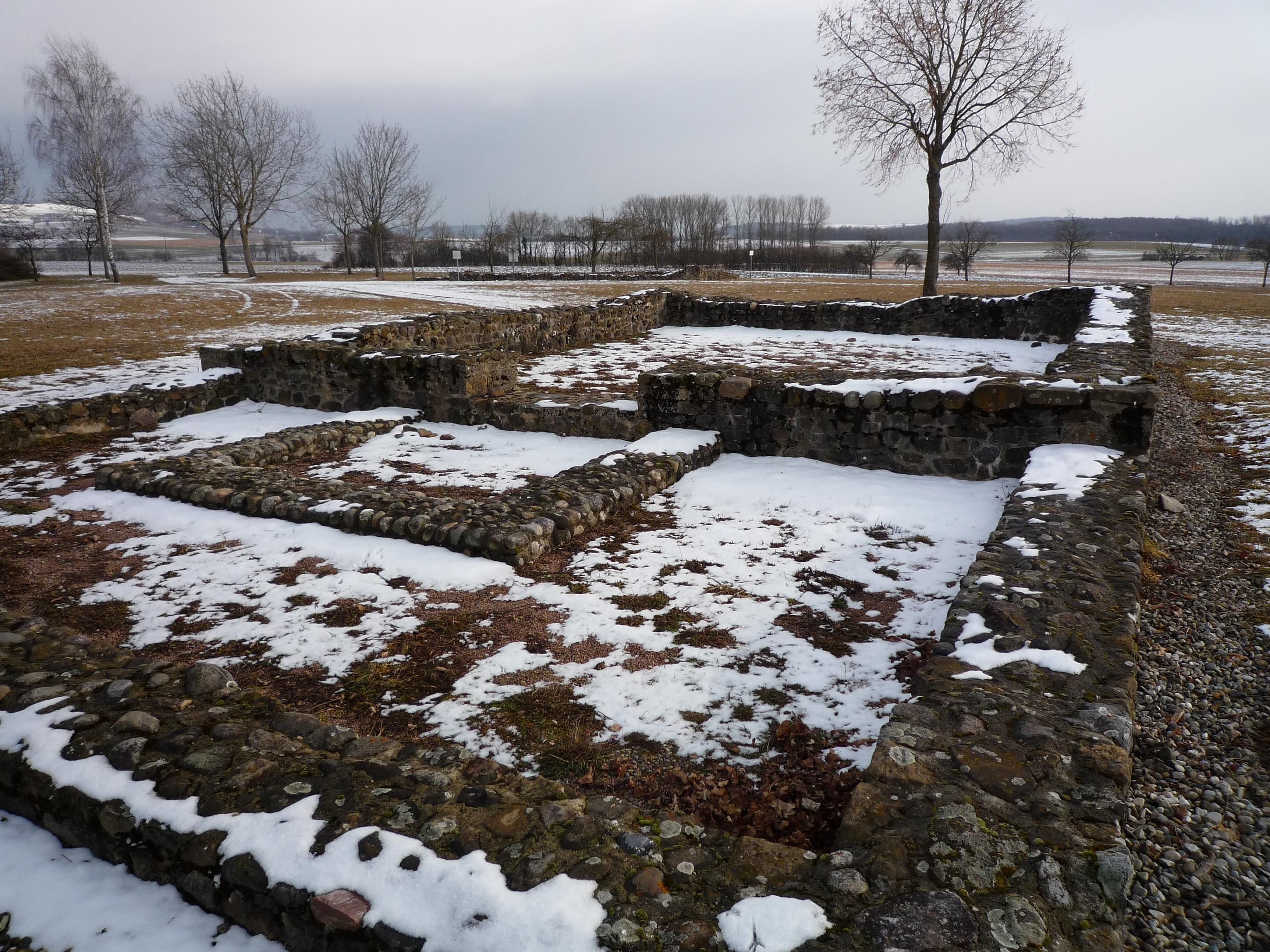 Tempel des Römischen Gutshofes bei Büßlingen/ Tengen (Gebäude 2)